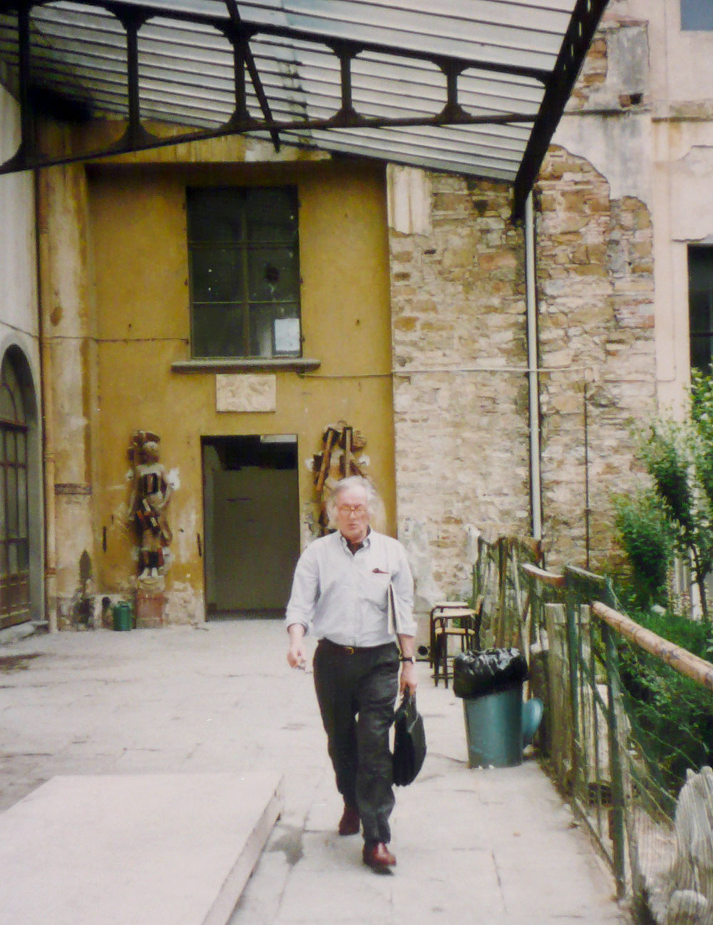 Leonardo Mattioli all'Istituto Statale d'Arte di Porta Romana, Firenze